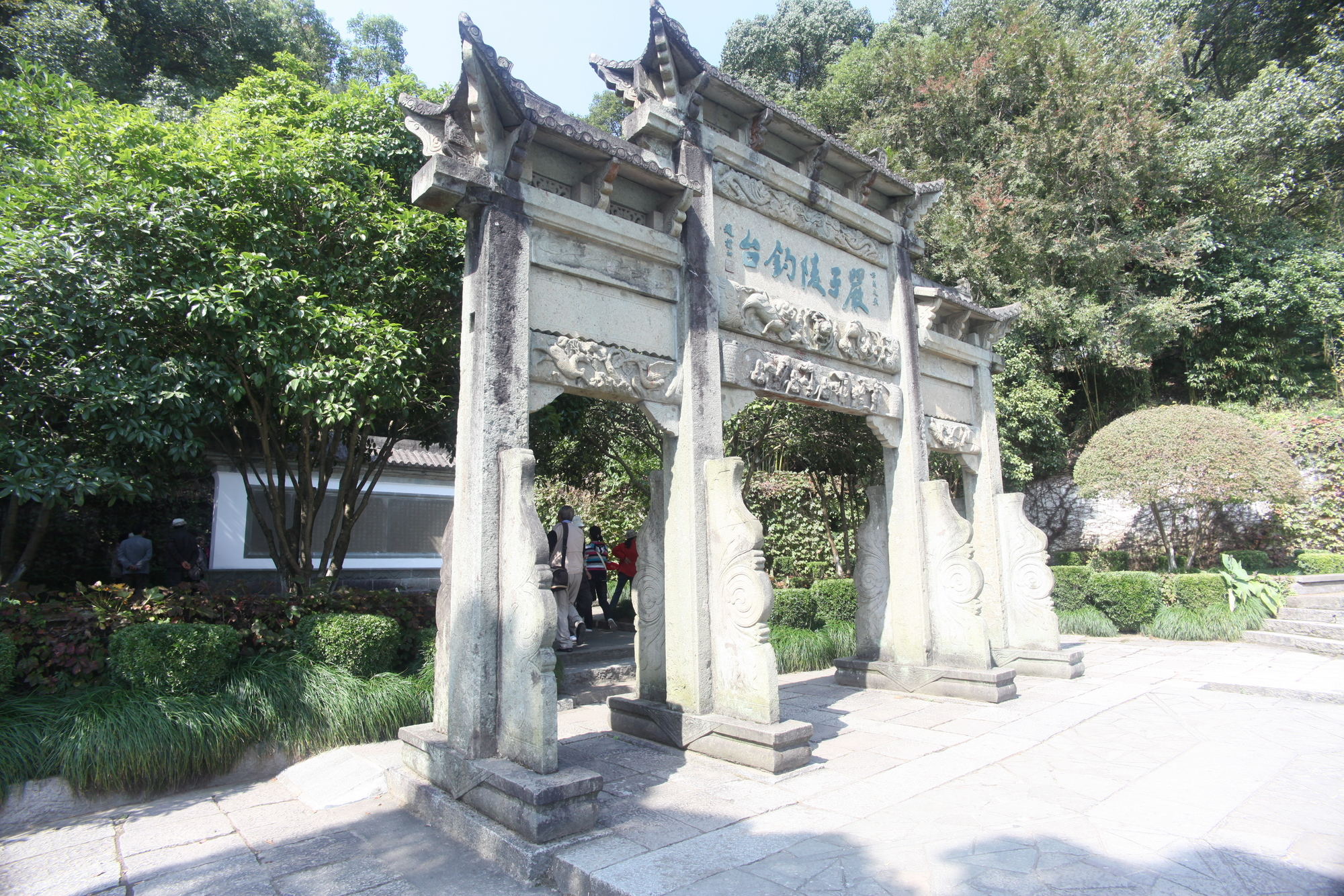 桐庐严子陵钓鱼台